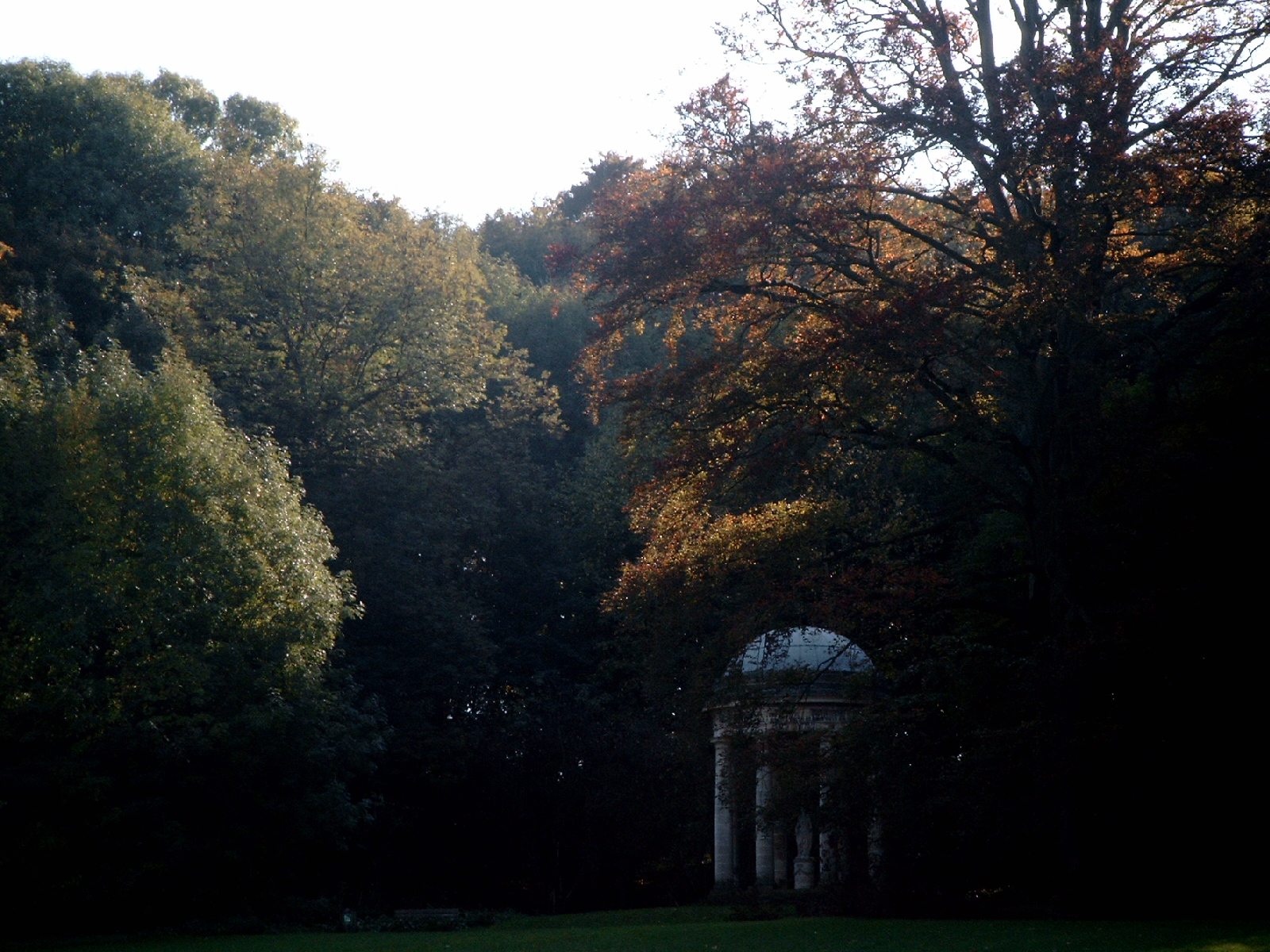 Zicht op Minervatempel in het Engels Park te Alden Biesen